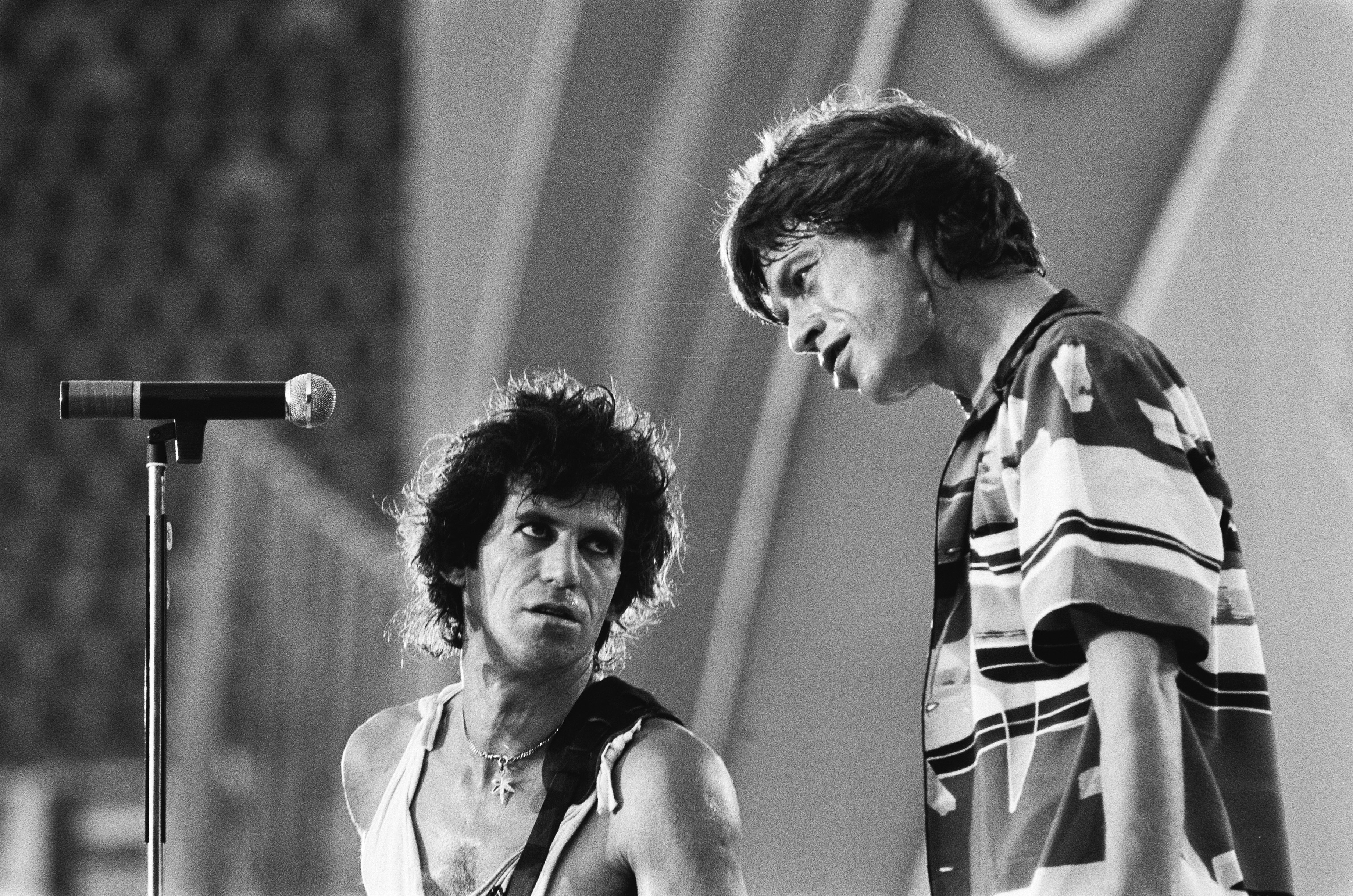 Collectie / Archief : Fotocollectie Anefo Reportage / Serie : [ onbekend ] Beschrijving : Optreden Rolling Stones in het Feijenoordstadion, Rotterdam; Mick Jagger en Keith Richard Datum : 2 juni 1982 Locatie : Rotterdam, Zuid-Holland Trefwoorden : popgroepen Persoonsnaam : Jagger, Mick Instellingsnaam : Rolling Stones Fotograaf : Antonisse, Marcel / Anefo Auteursrechthebbende : Nationaal Archief Materiaalsoort : Negatief (zwart/wit) Nummer archiefinventaris : bekijk toegang 2.24.01.05 Bestanddeelnummer : 932-1927